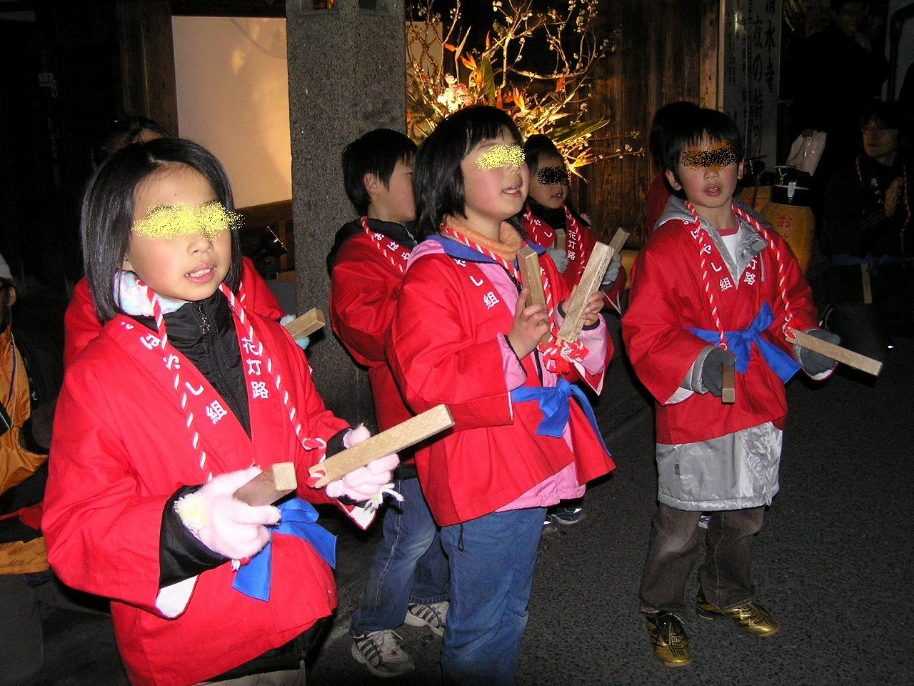 京都・東山花灯路清水坂